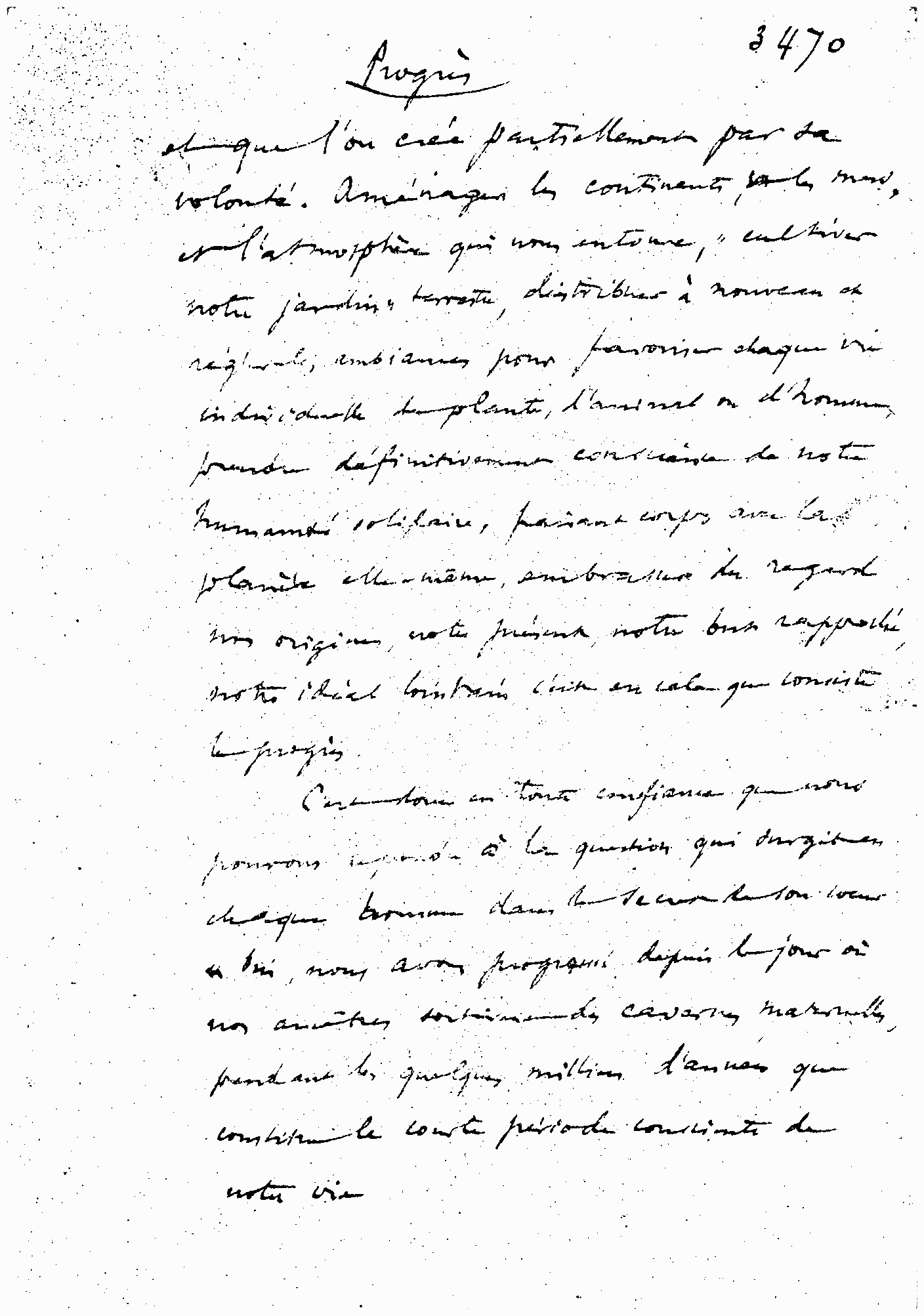 Page du manuscrit de l’Homme et la Terre - 2